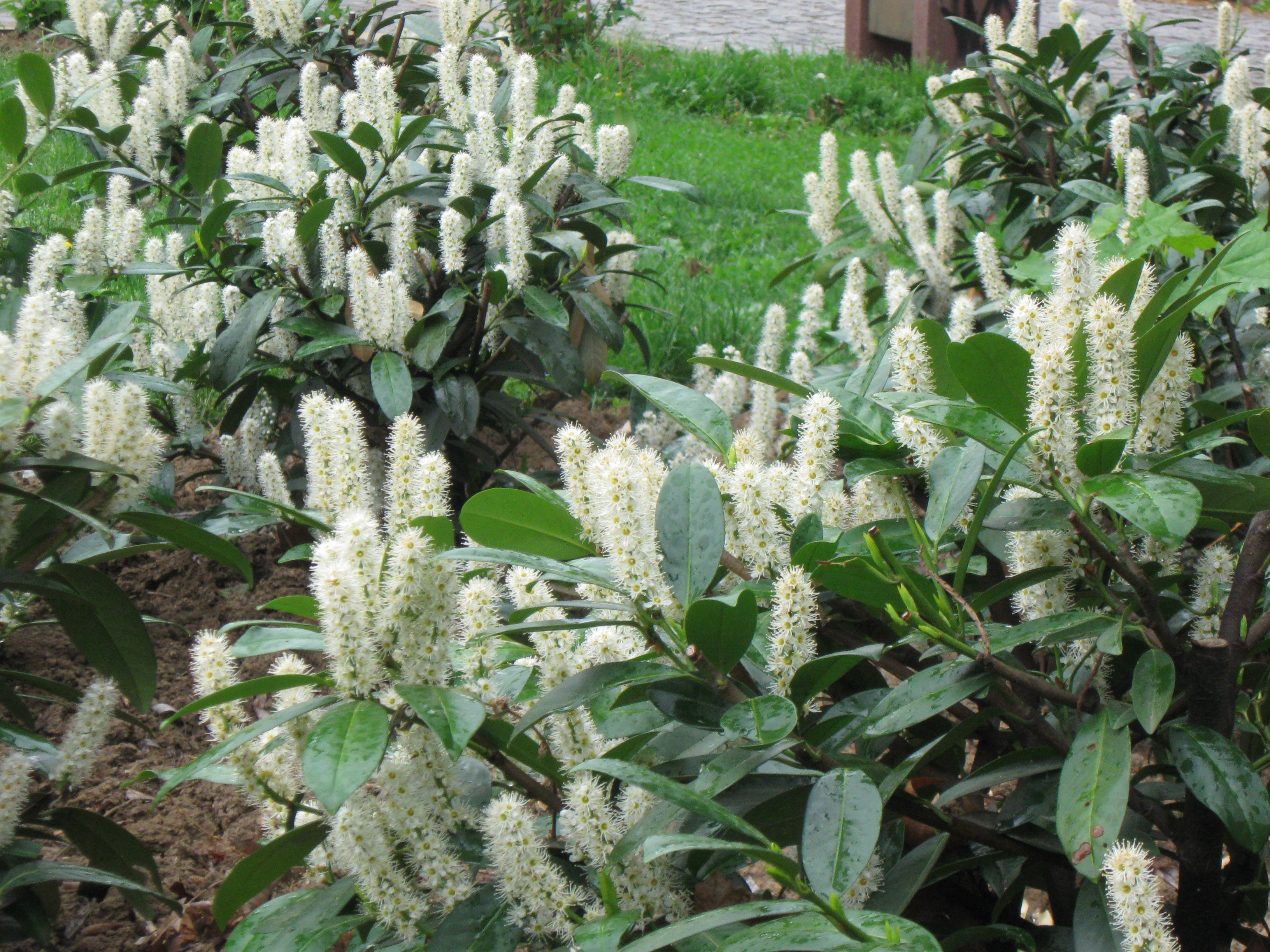 Ловорвишња у цвету у нишком парку „Свети Сава“